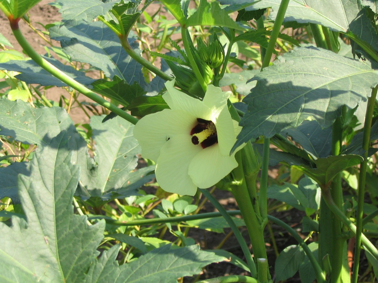 Flowers of Abelmoschus esculentus, or Okra